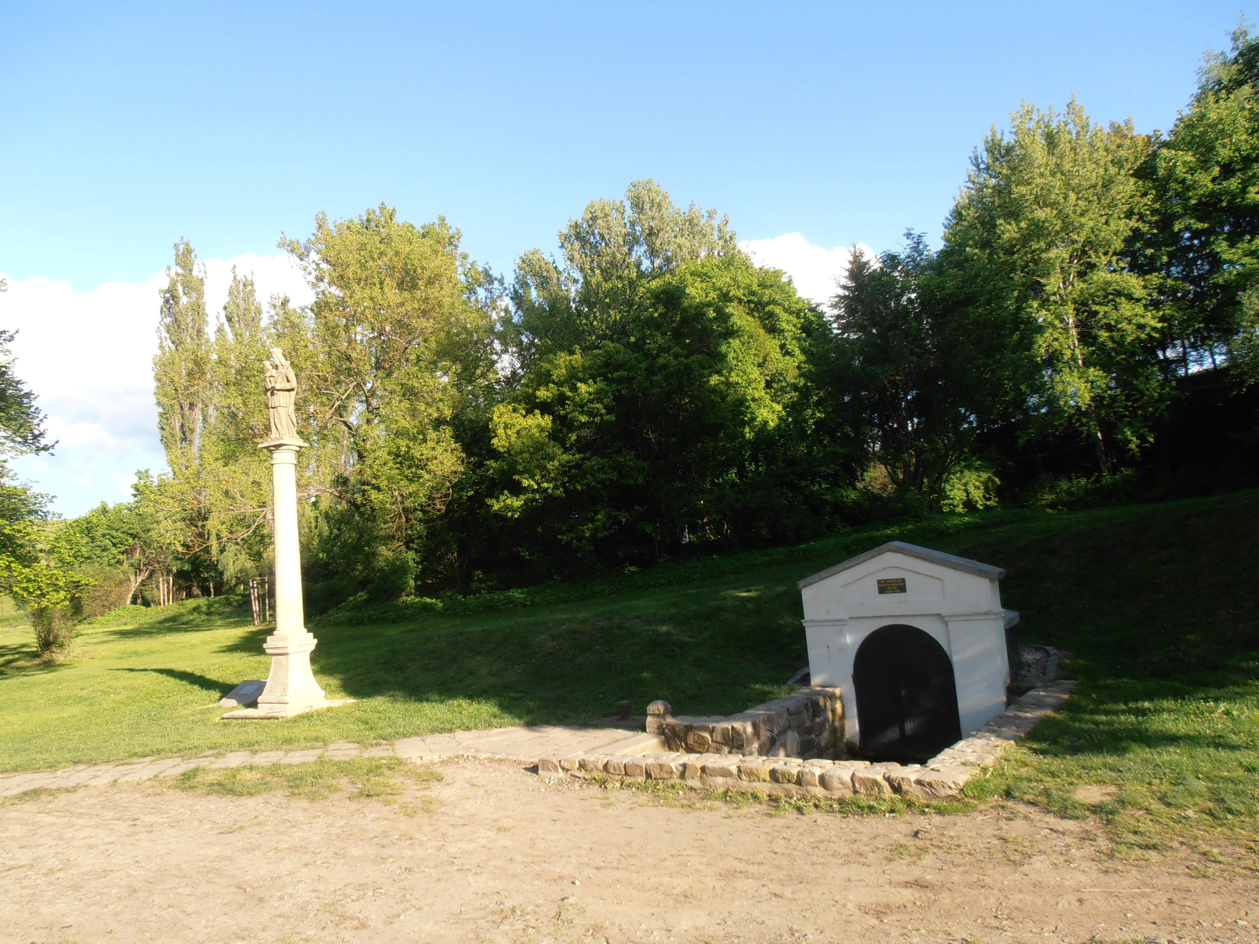 Sloup se sochou Panny Marie, u studánky s lipou, Jihlava